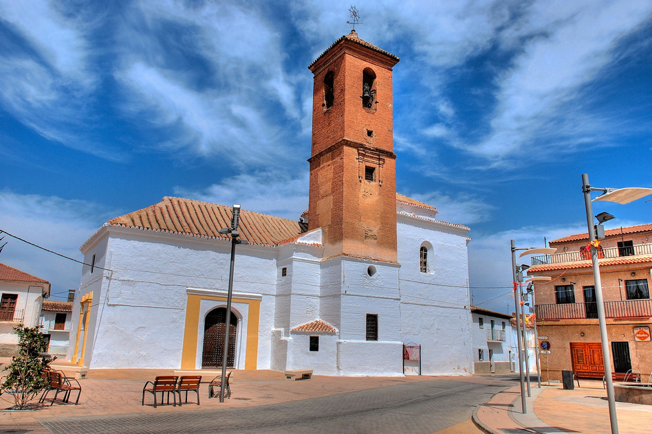 Iglesia de La Anunciación de Albuñán